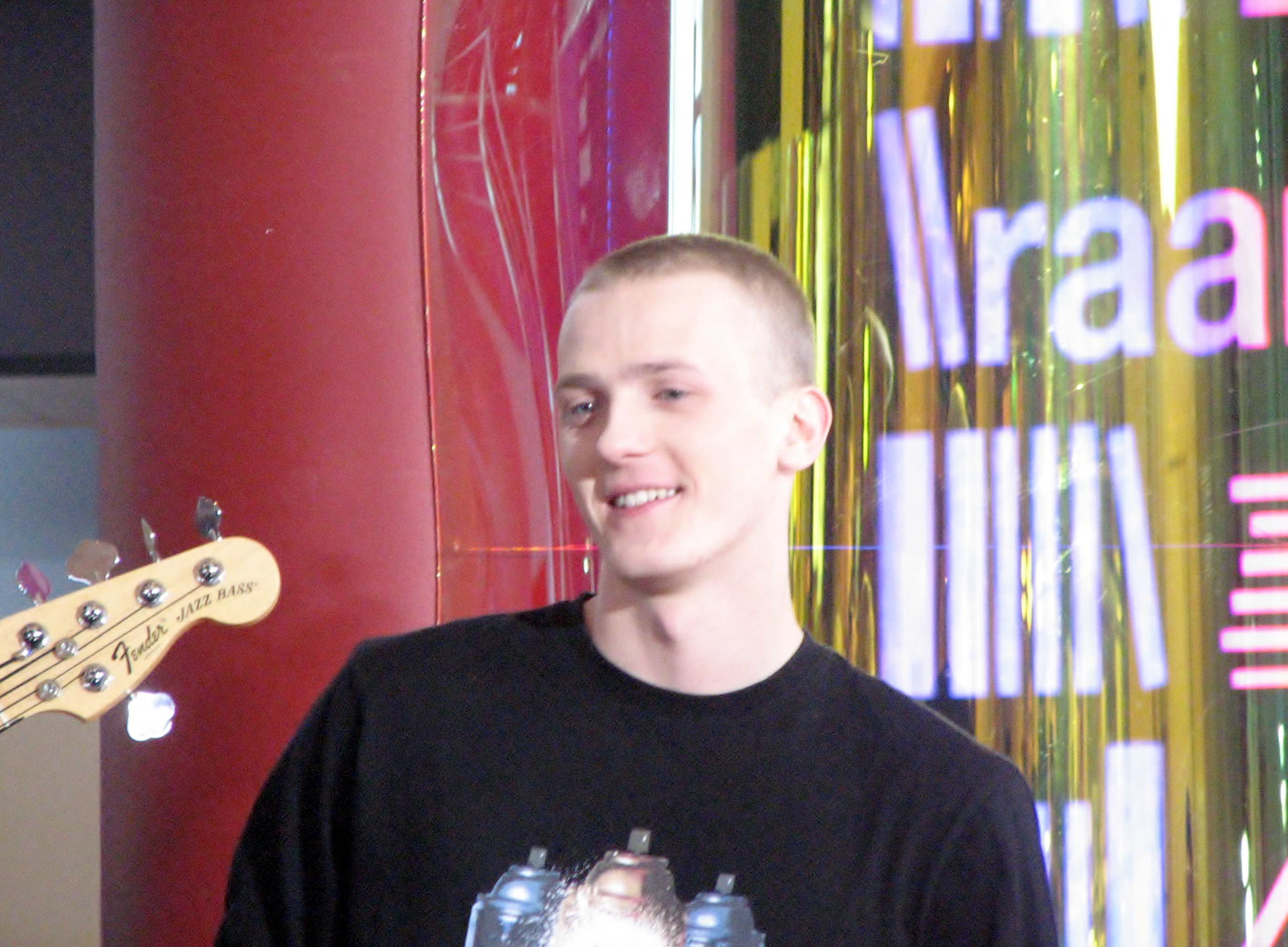 Alvar Risto Vürst Põhja-Tallinna koosseisus saate "Ringvaade" Eesti Laul 2013 salvestusel